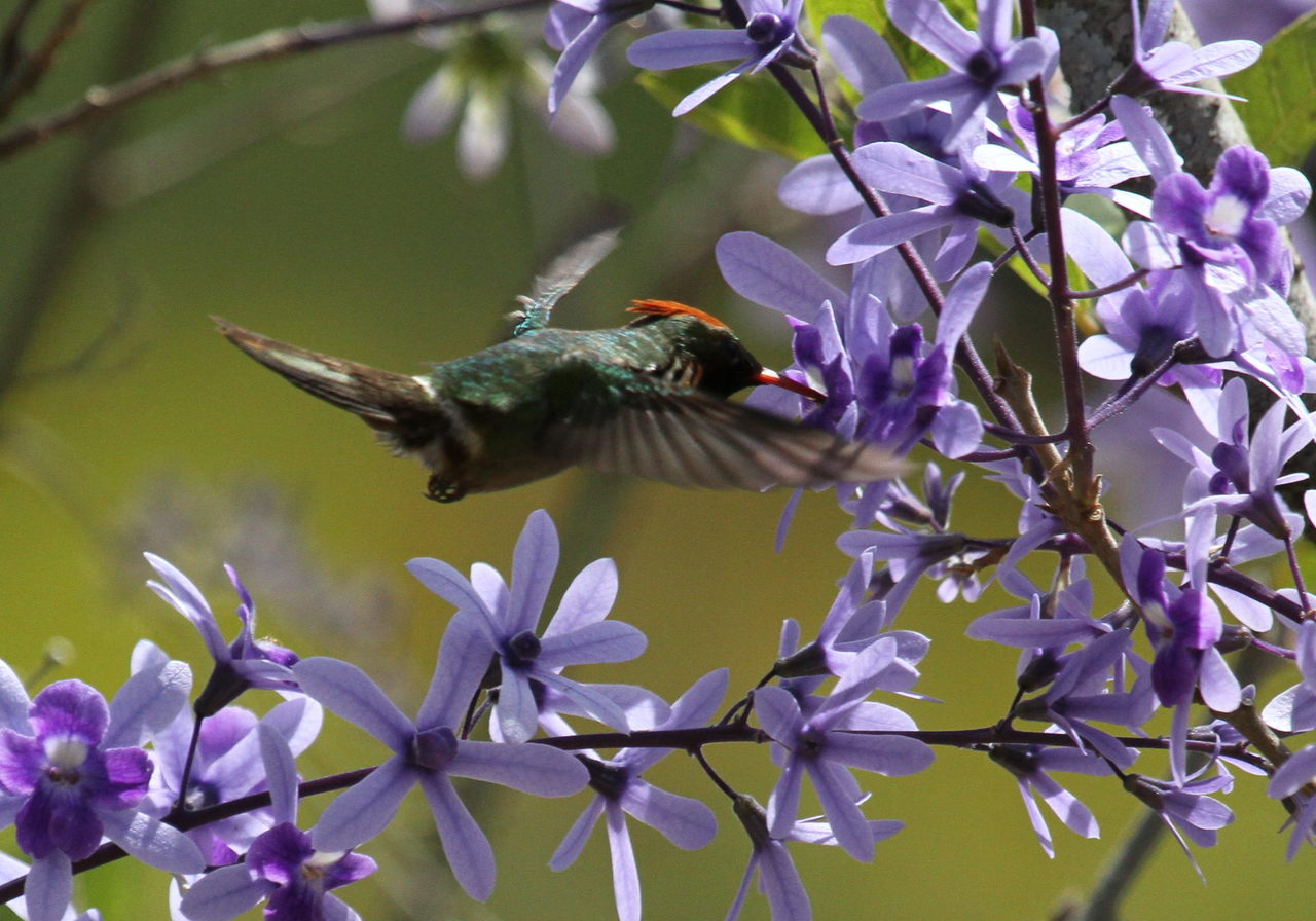 Strange little rooikoppie hummingbird on Petrea volubilis